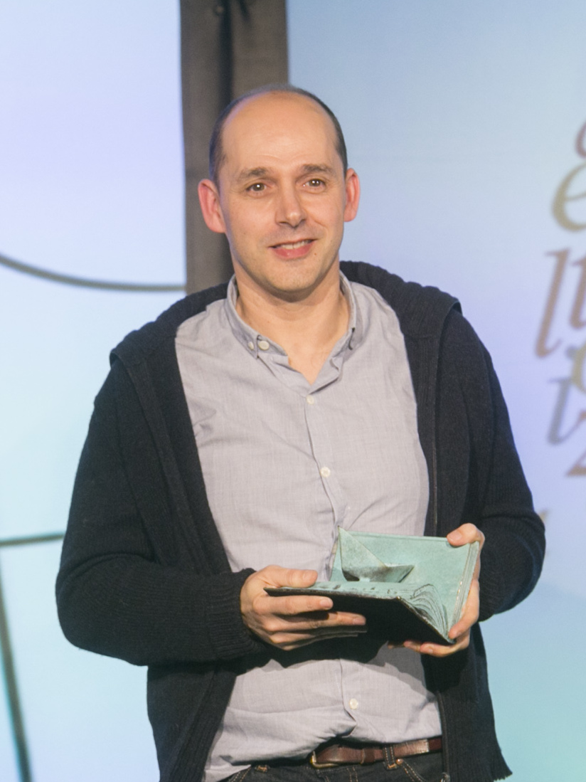 El Lehendakari Iñigo Urkullu ha presidido hoy la gala de entrega de los Premios Euskadi de Literatura, un acto que ha tenido lugar en Azkuna Zentroa de Bilbao y en el que, por parte del Gobierno Vasco, ha participado también el consejero de Cultura y Política Lingüística, Bingen Zupiria. Al acto han asistido los siete premiados de la presente edición: Asier Serrano, en la modalidad de Literatura en Euskera; Fernando Aramburu, en la de Literatura en Castellano; Arantxa Urretabizkaia, Ensayo en Euskera; Ander Izagirre, Ensayo en Castellano; Leire Bilbao, Literatura Infantil y Juvenil; Mikel Valverde, en la modalidad de Ilustración de Obra Literaria; y, por último, Matías Múgica, Traducción de Obra Literaria en Euskera.